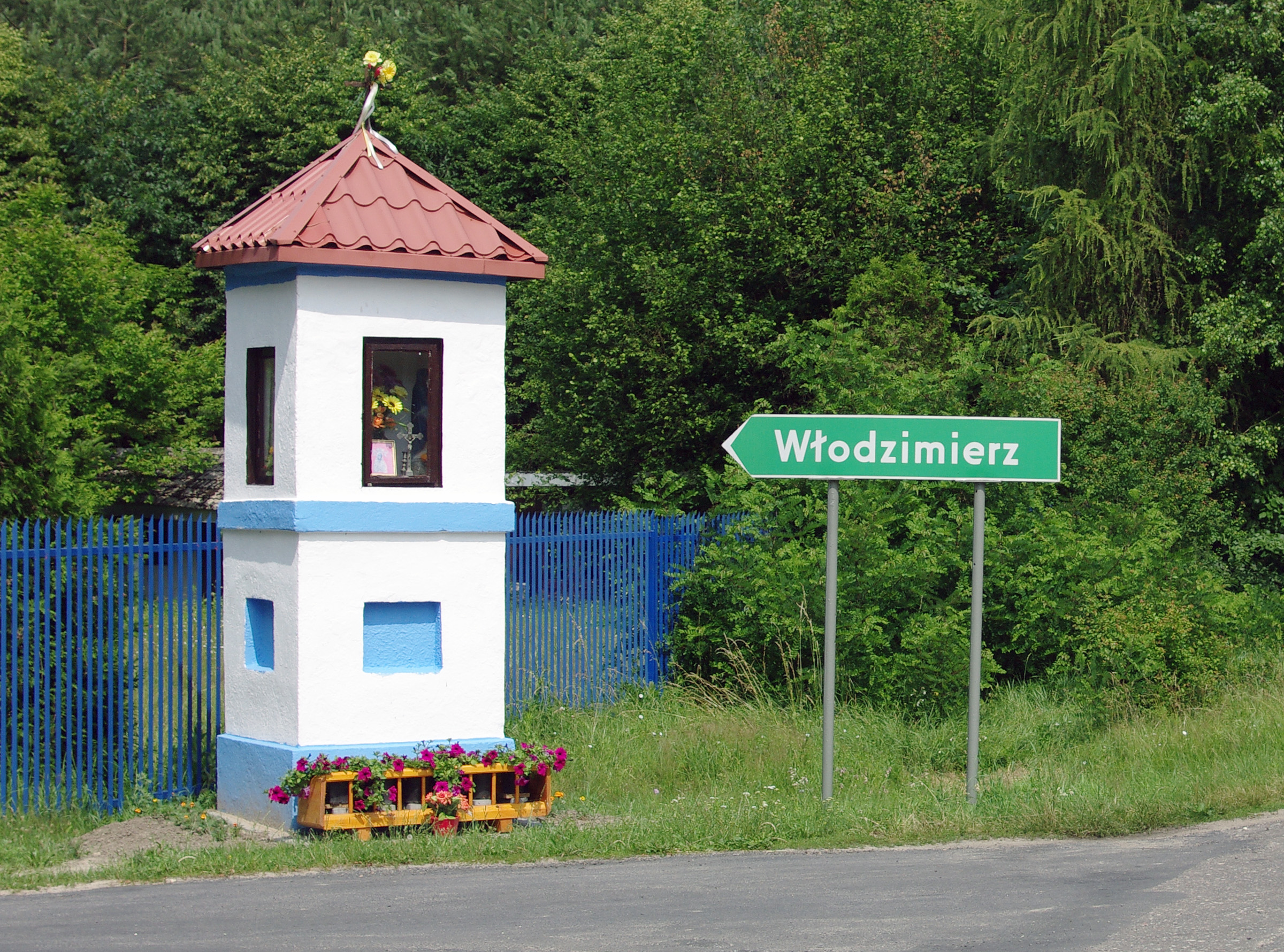 Wjazd do miejscowości Włodzimierz w powiecie łaskim od strony Janowic